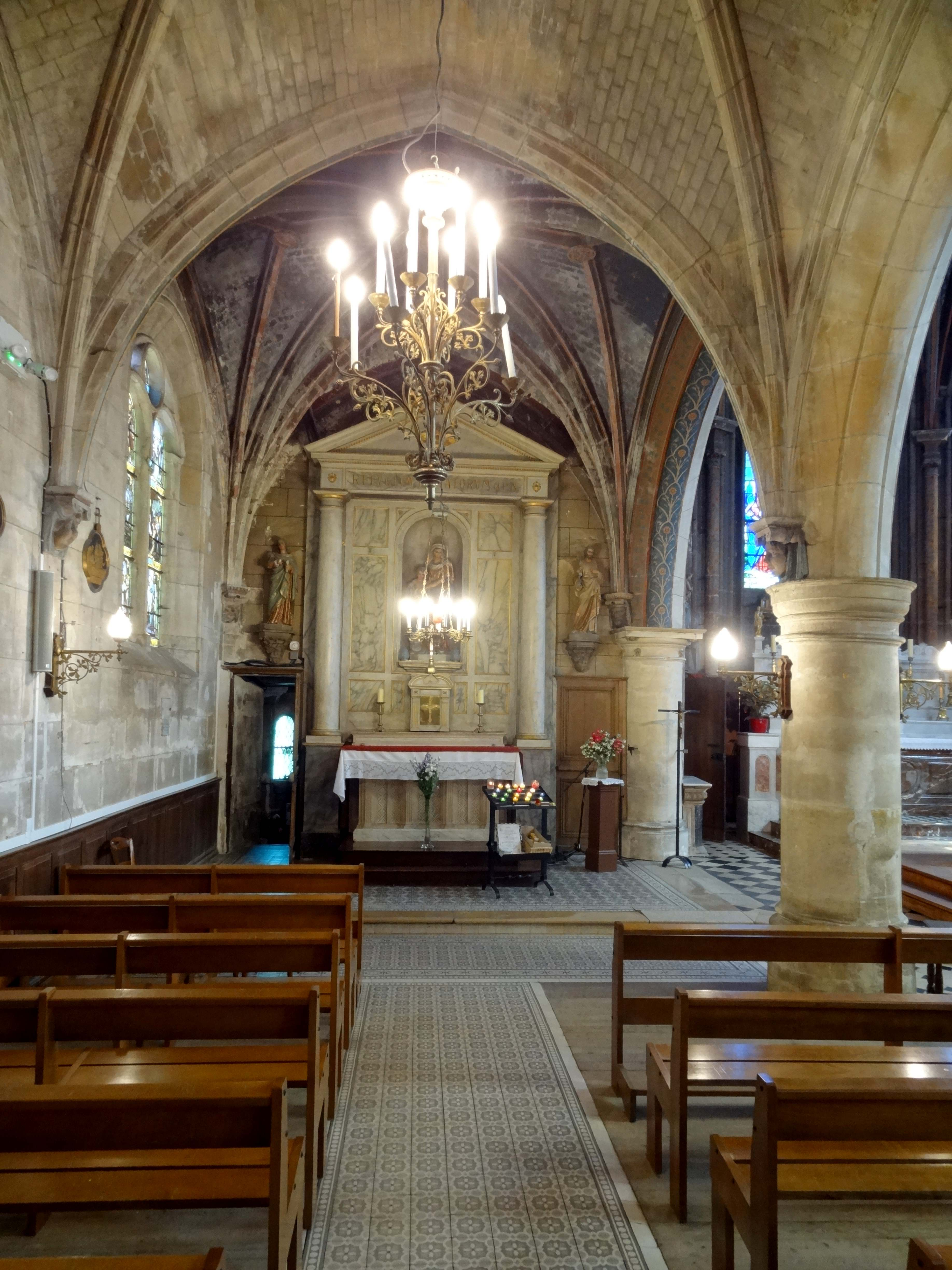 Intérieur de l'église - voir titre.